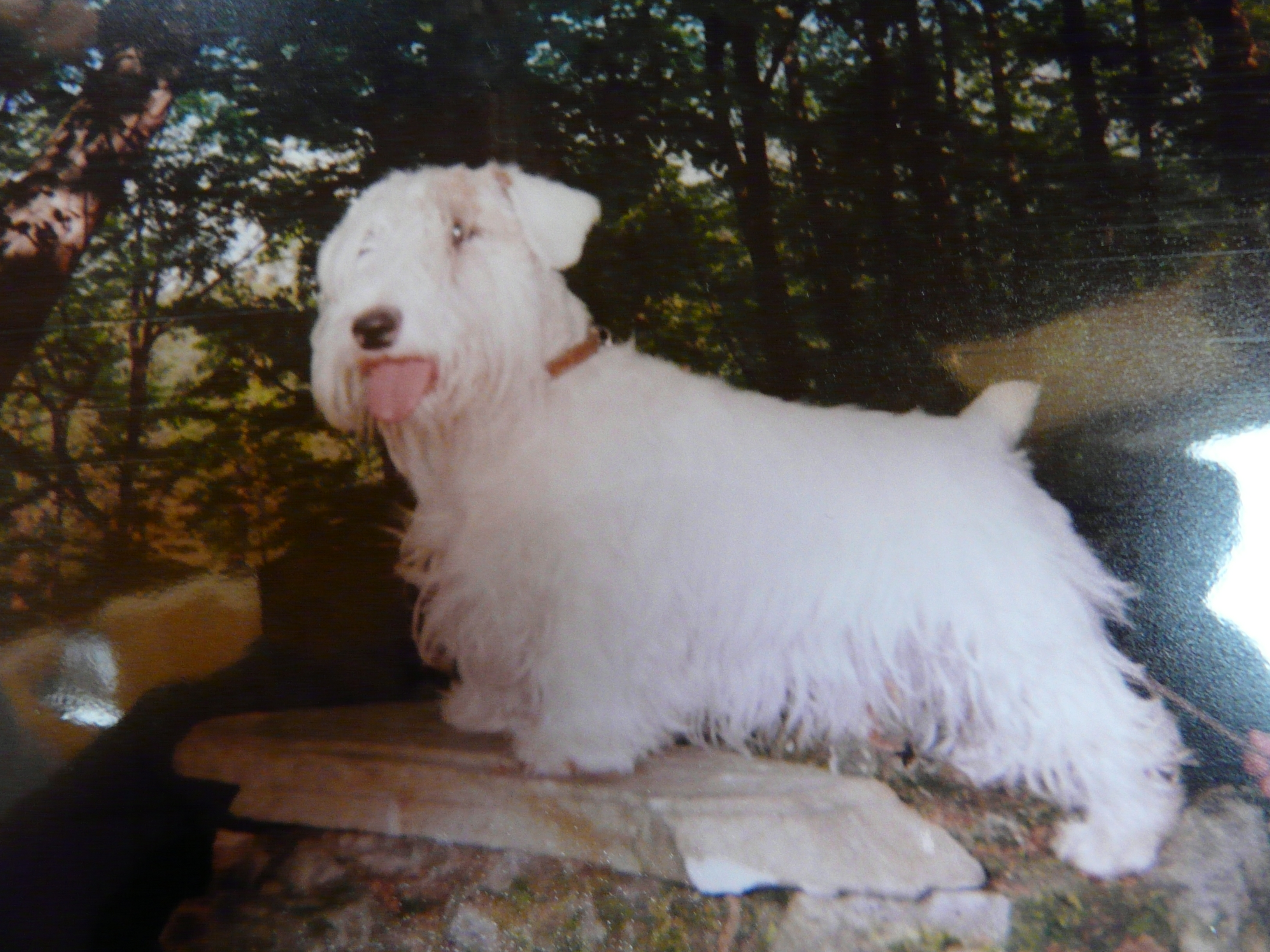 Sealyham teriér